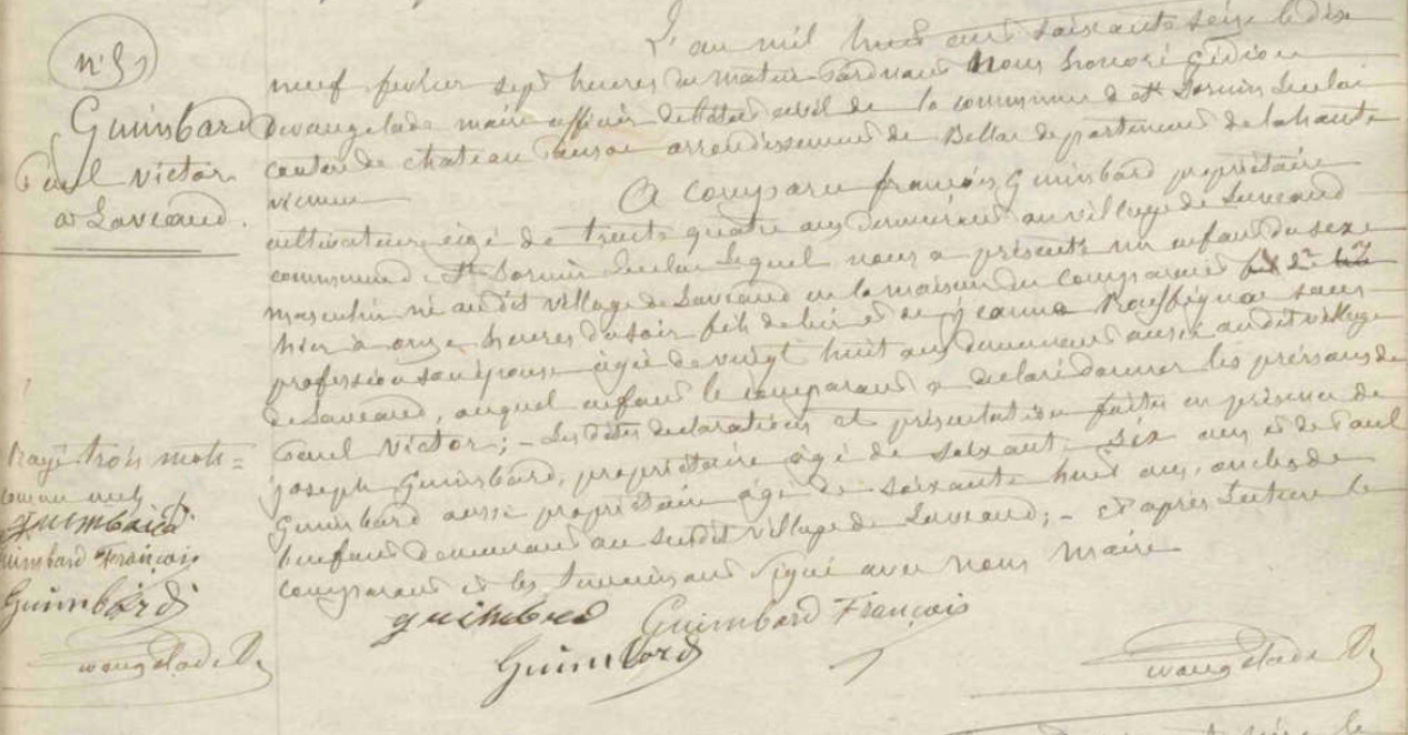 extrait des registres de l'Etat Civil 1869-commune de Saint-Sornin-Leulac